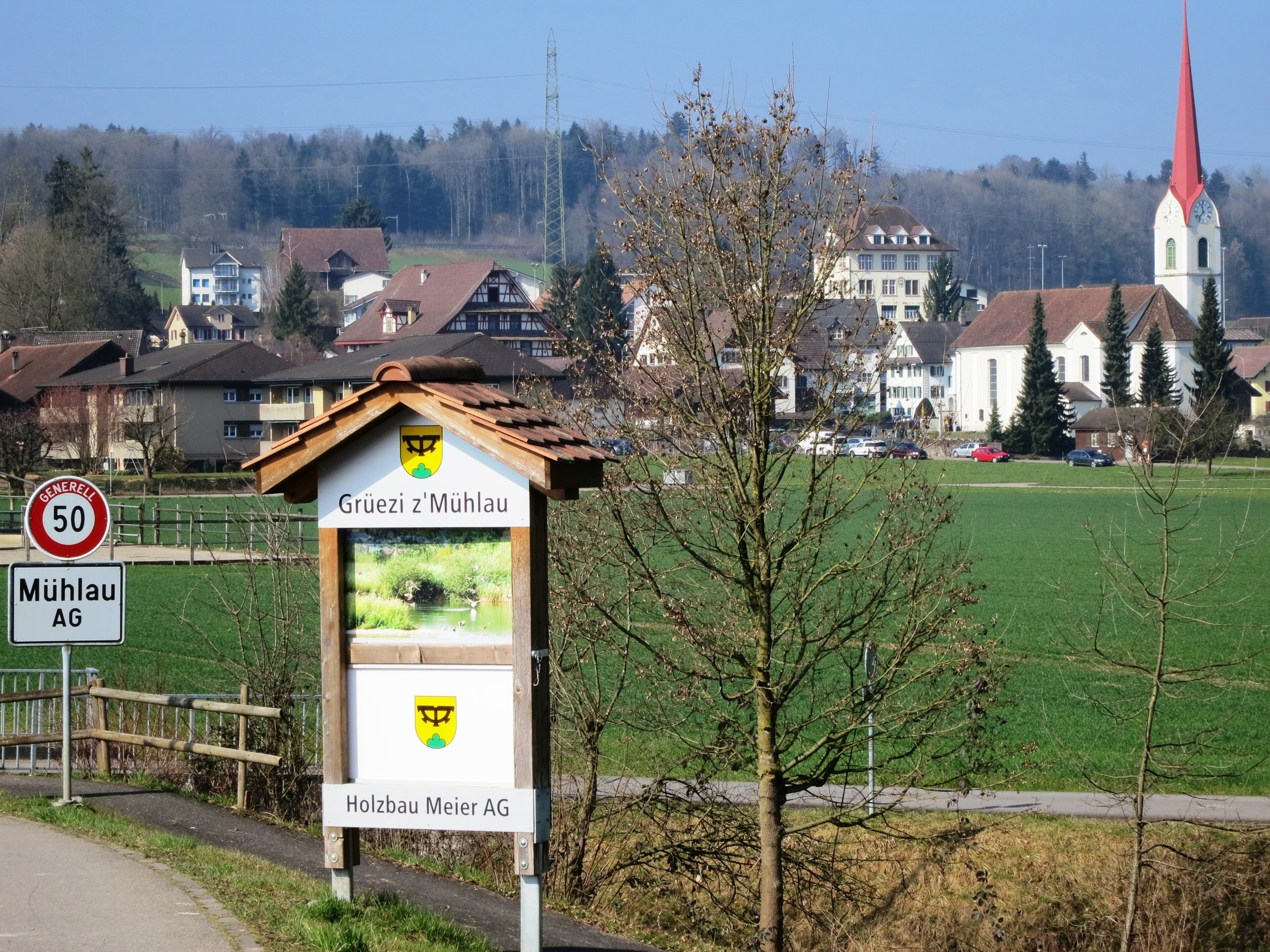 Mühlau AG, Schweiz